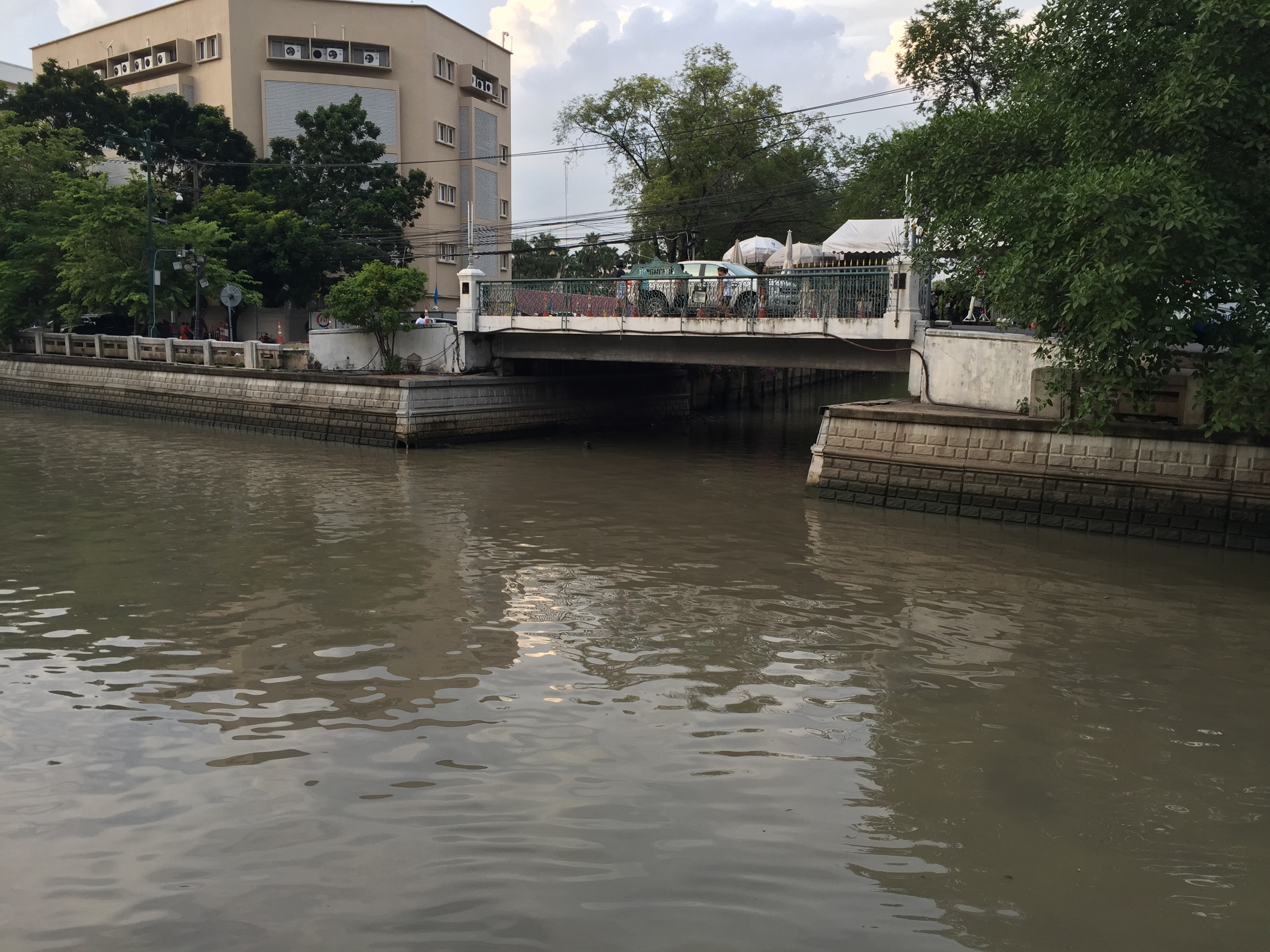 จุดเริ่มต้นคลองเปรมประชากรกับคลองผดุงกรุงเกษม หน้าวัดโสมนัสวิหาร กรุงเทพมหานคร